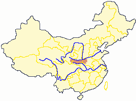 Karte selbst angefertigt ; GNU-FDL